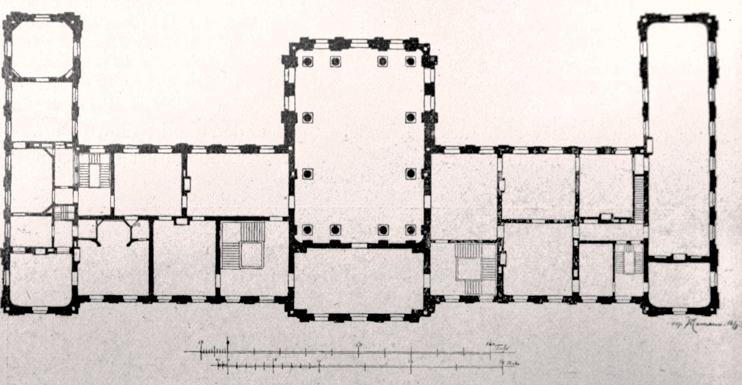 Grundriss Schloss Ludwigslust, 1. Hauptgeschoss